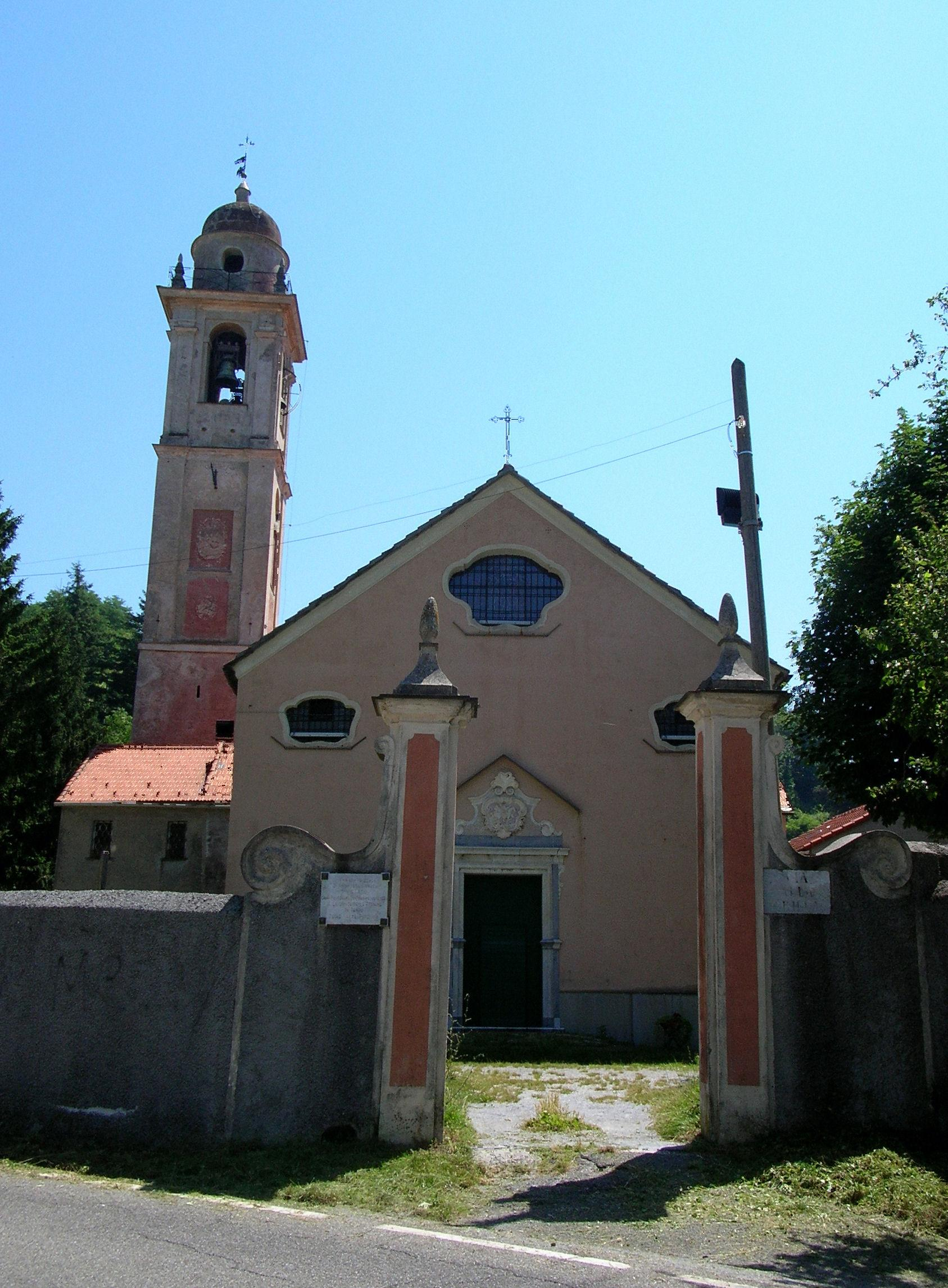 Foto propria Giugno 2008 Ceranesi (Genova) Chiesa di S. Martino di Paravanico